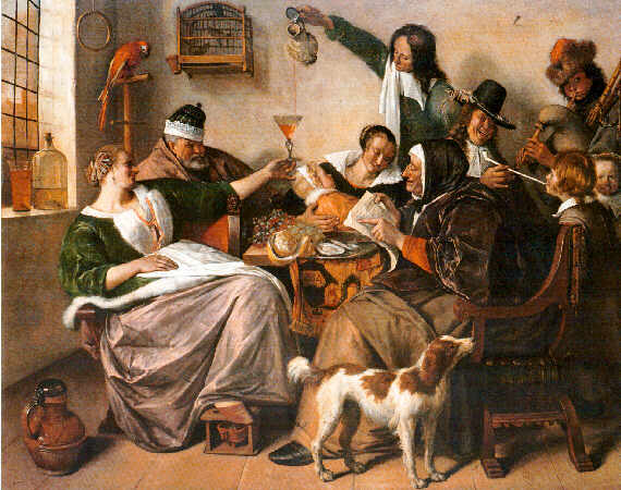 Gemälde von Jan van Steen: Soo voer gesongen, soo na gepepen ca. 1664